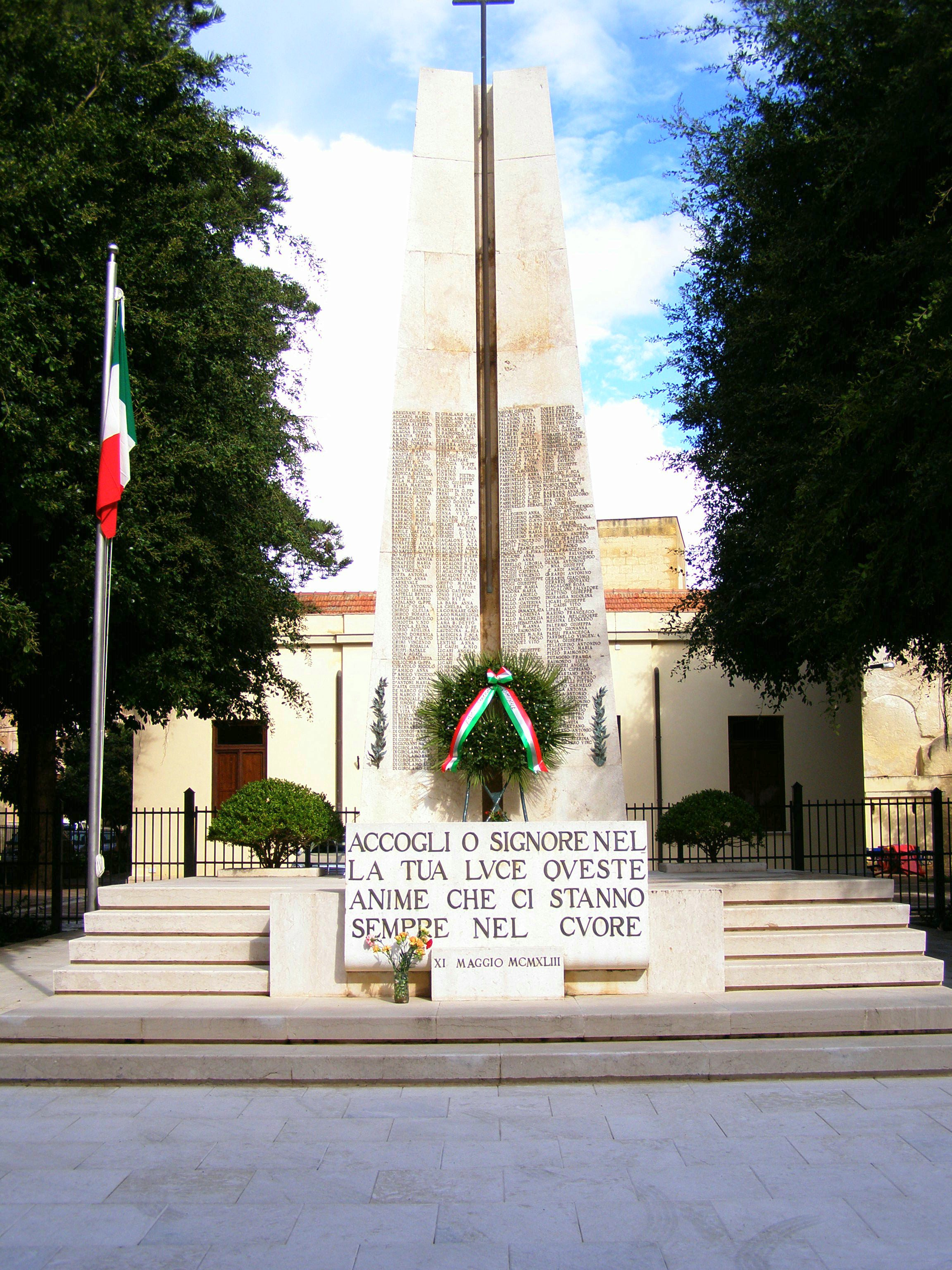 Monumento alla vittime dei bombardamenti alleati del maggio 1943, Marsala(Scattata da me)